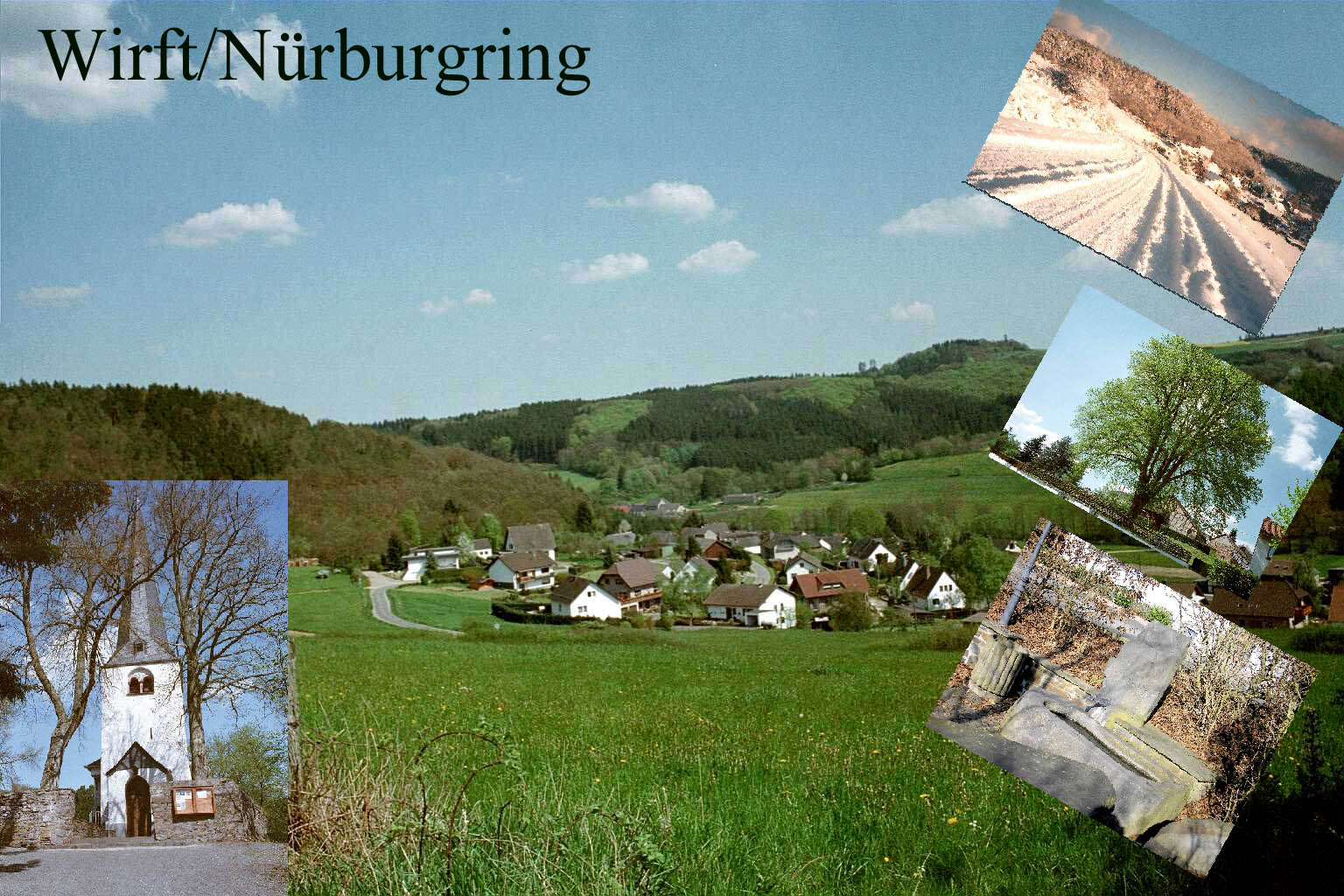 Postkarte von Wirft Das Bild zeigt das Dorf Wirft von Nordwesten gesehen mit Kirche in Kirmutscheid (Ortsteil von Wirft), Wirft im Schnee, die schöne Linde auf dem Spielplatz, und den Dorfbrunnen. Ist das eine selbstgemachte Postkarte, oder nur ein selbstgemachter Scan eine kommerziellen Postkarte? ---AndreasPraefcke ¿! 21:29, 17. Jul 2005 (CEST) Siehe oben. --Crux ふ 22:23, 23. Jul 2005 (CEST)